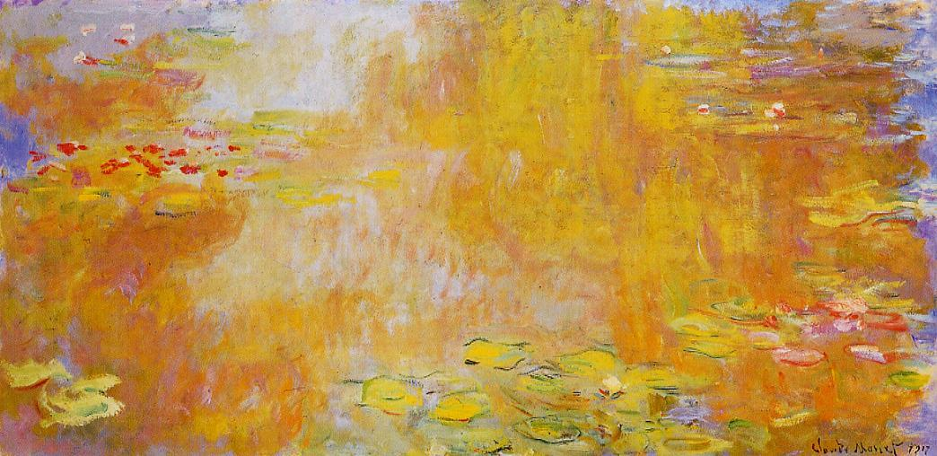 Le bassin aux nymphéas ou Les nymphéas à Giverny, Claude Monet, huile sur toile, 100 x 200 cm, Musée des beaux-arts, Nantes, France